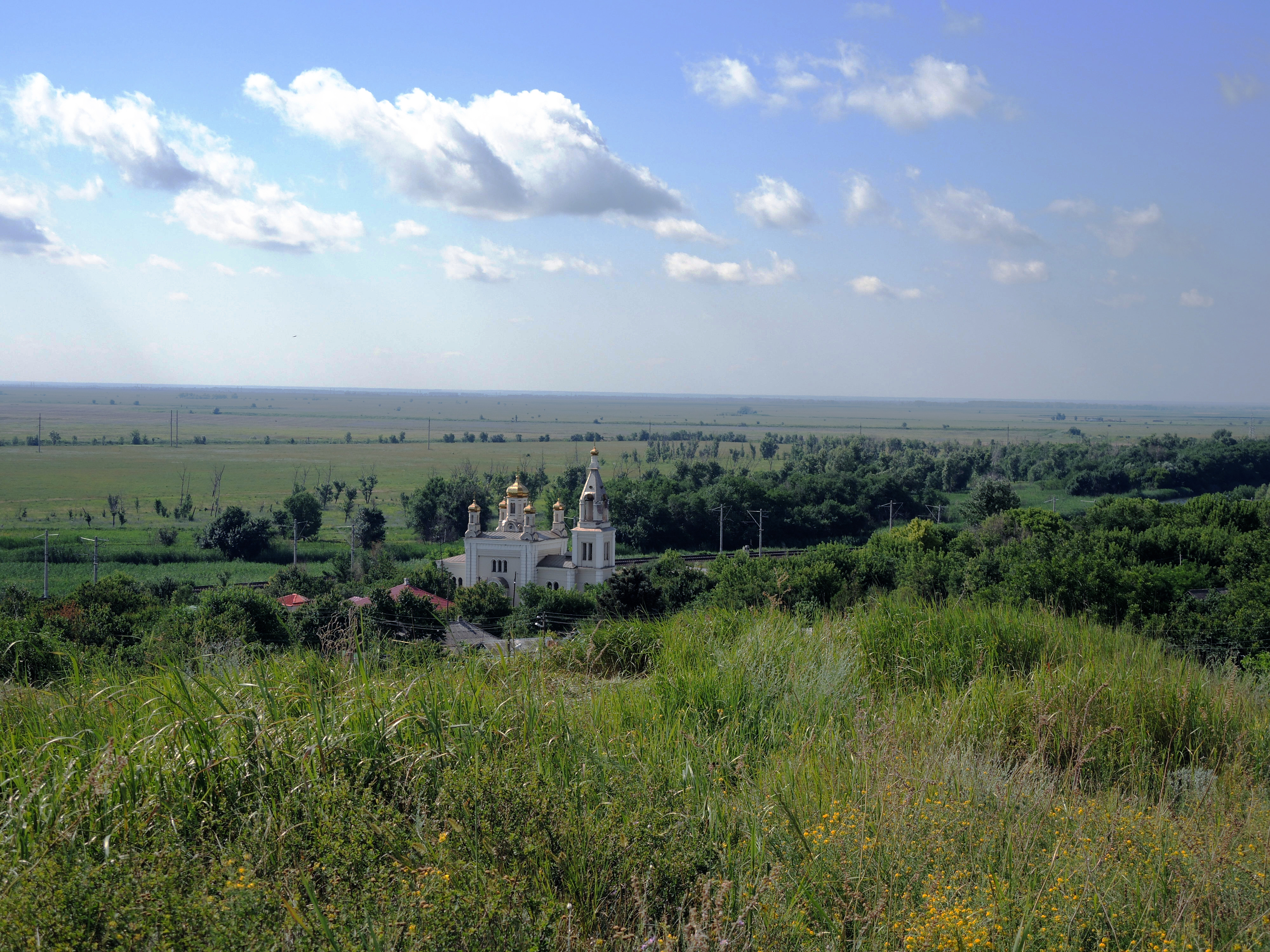 Церковь Рождества Пресвятой Богородицы (1865), усыпальница рода Платовых (с 1867) и графа М.И. Платова (в период 1875-1911): х. Малый Мишкин, Аксайский район, Ростовская область